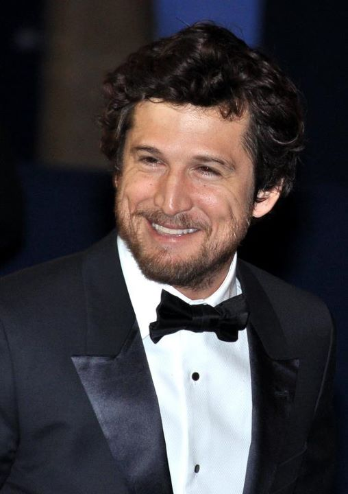 Guillaume Canet à la cérémonie des César